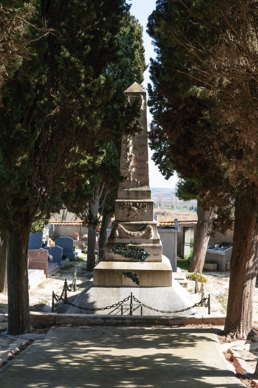 Monument aux morts - Archives départementales de l’Hérault - FRAD034-2458W-Poilhes-00001